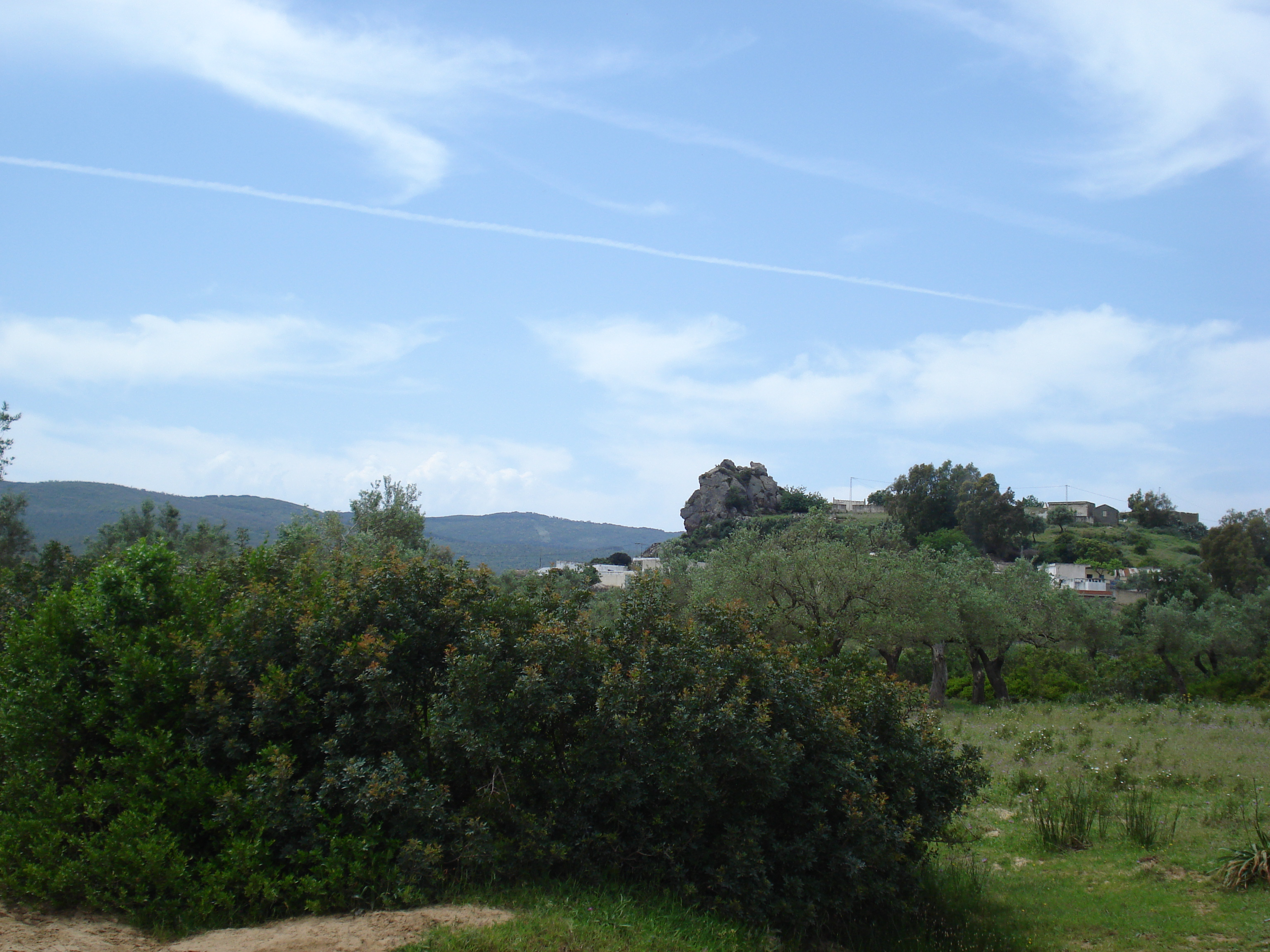 Village "Ain El Karma" sur la Route Régionale n°58, Délégation de Sejnane, Gouvernerat de Bizerte, Tunisie